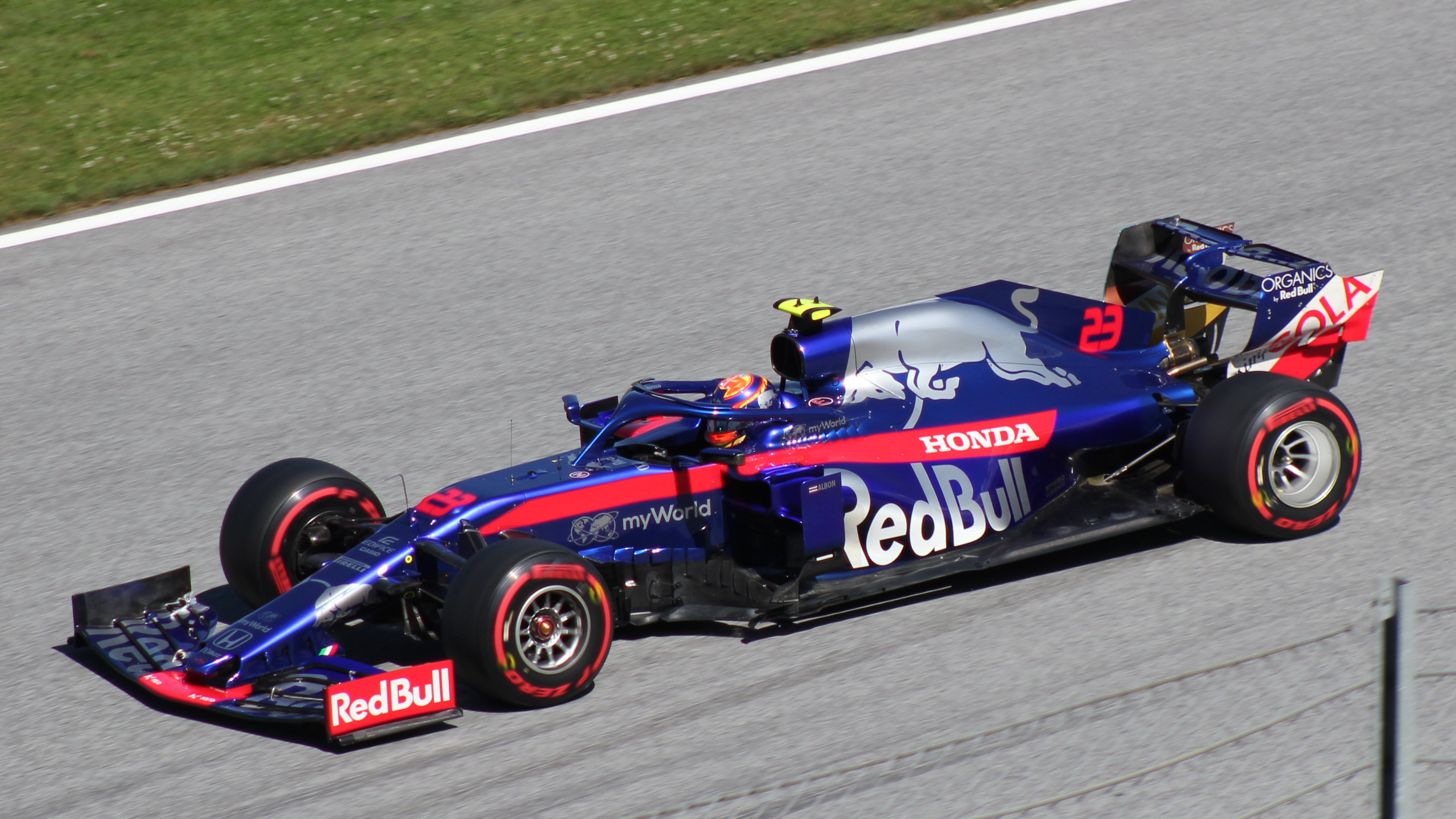 Albon beim Rennwochenende in Österreich 2019